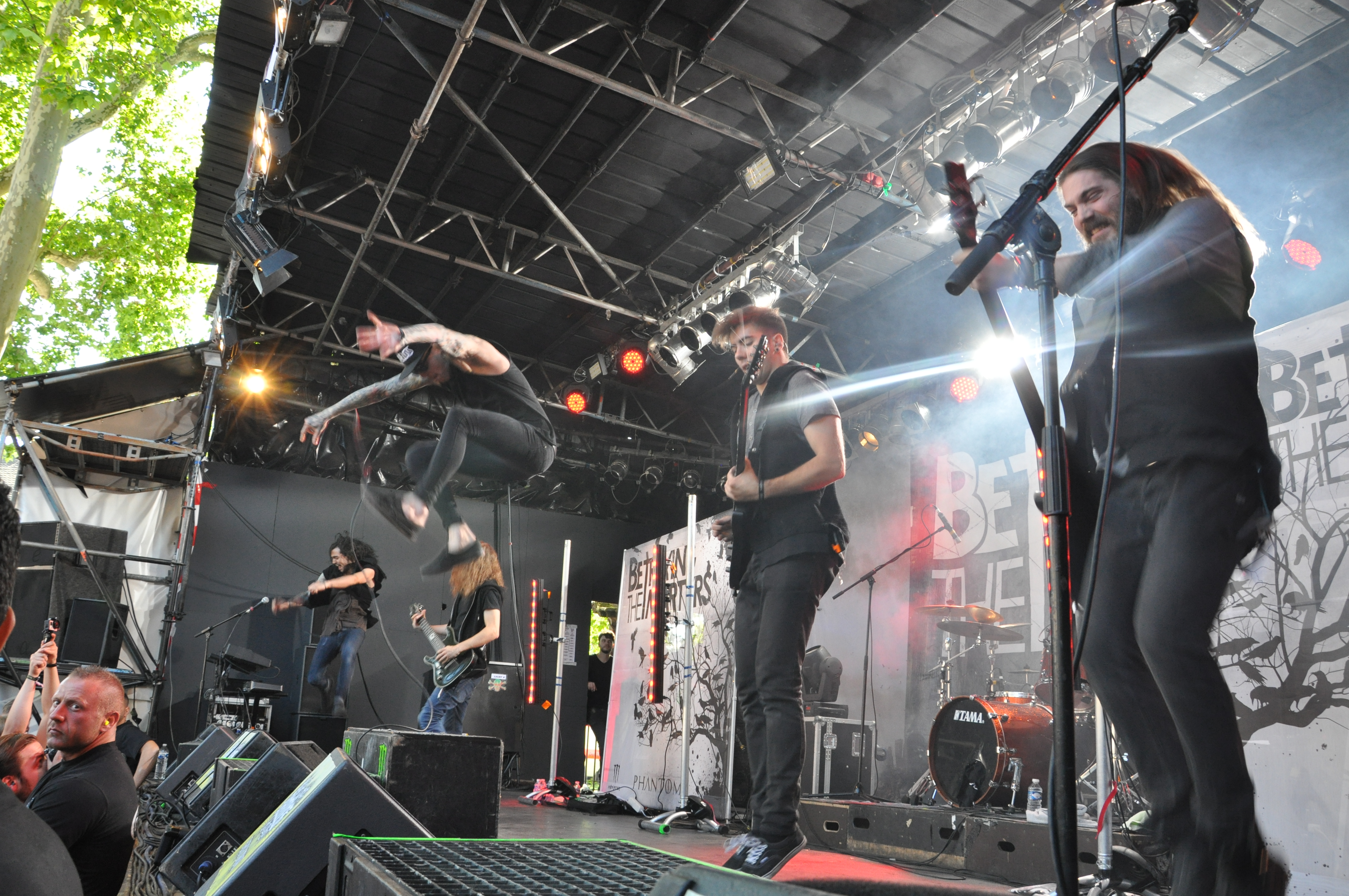 Betraying the Martyrs auf der Open-Air-Bühne beim Summerblast Festival 2014